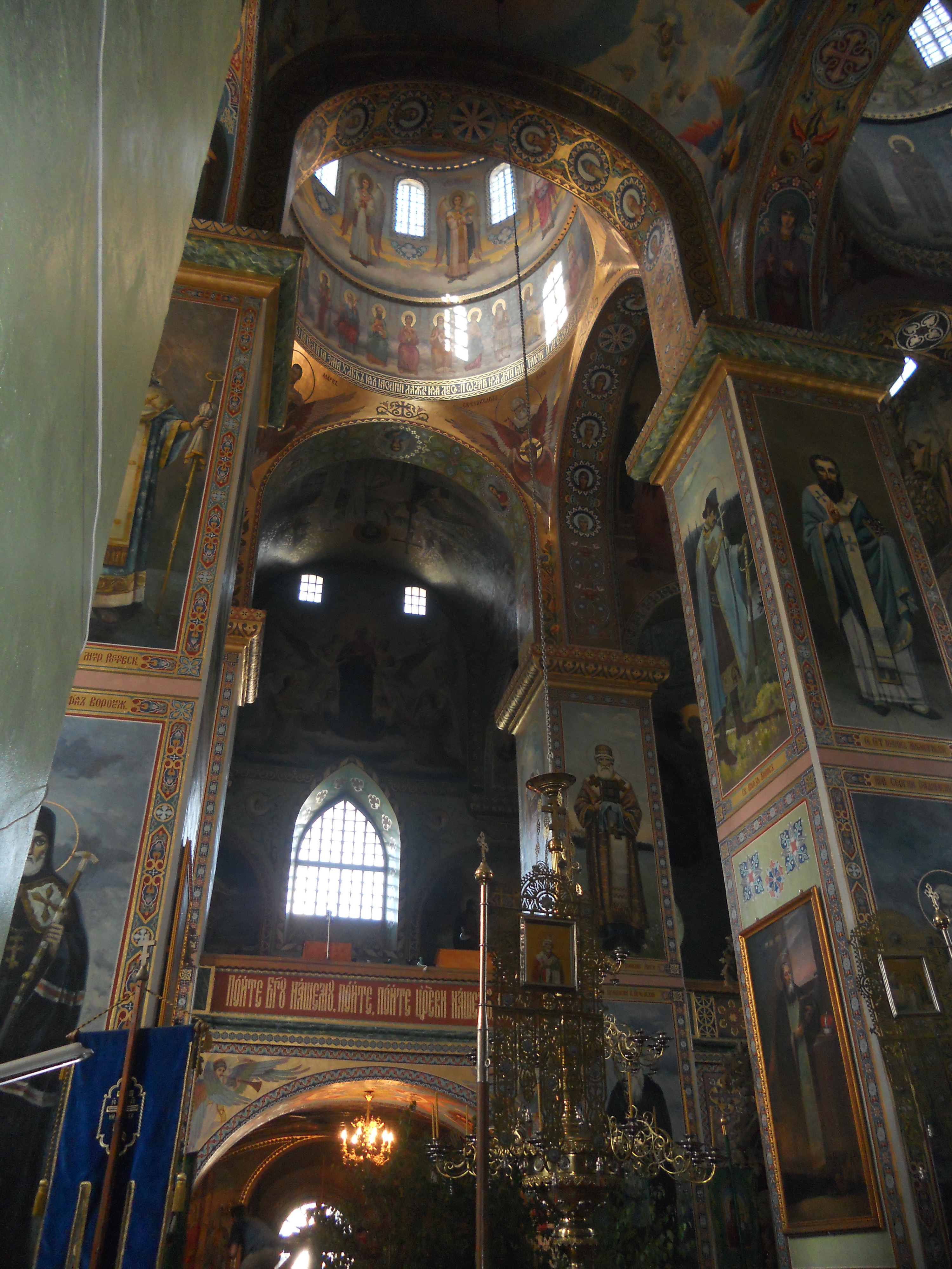 Інтер'єр Межиріцького монастиря.